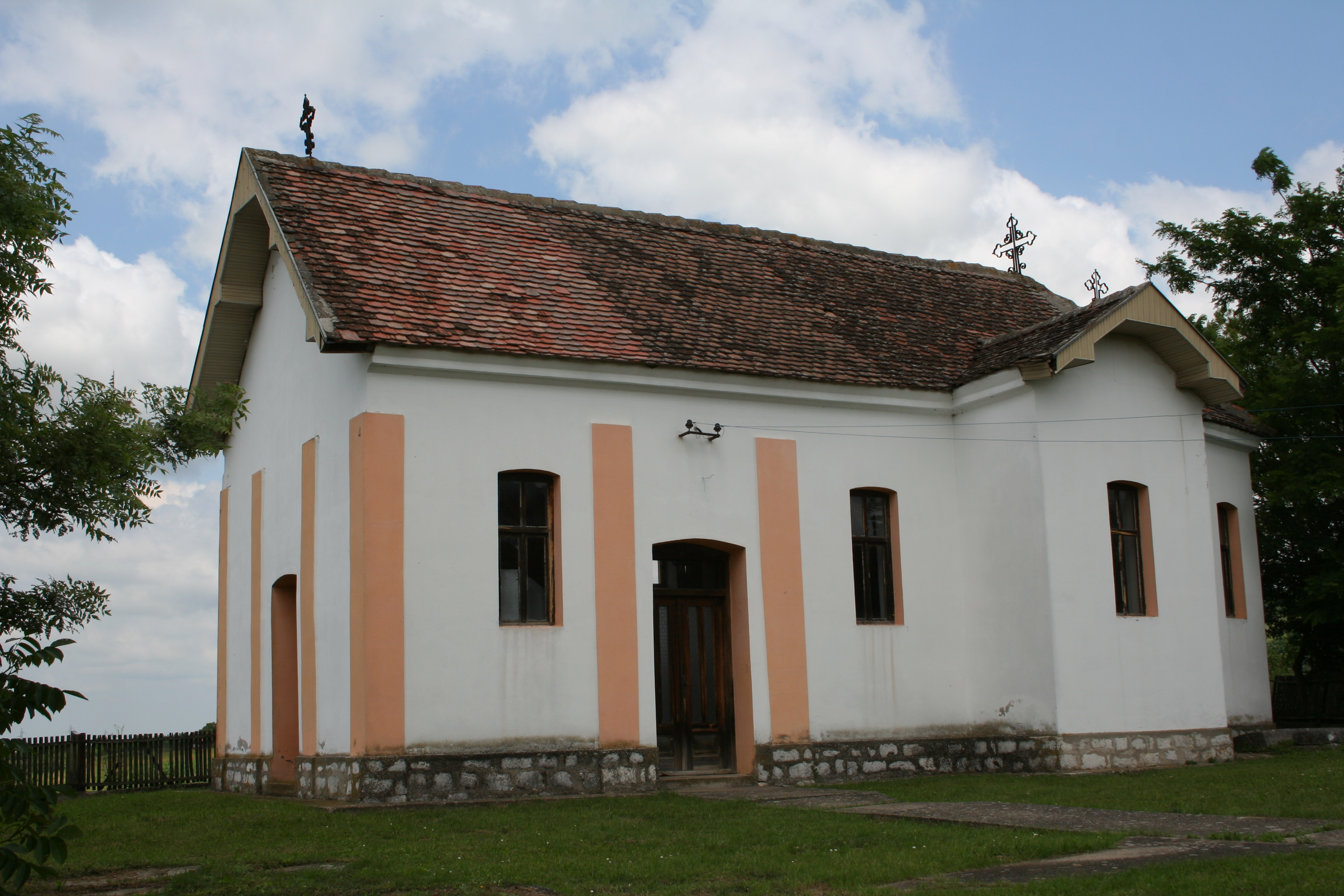 Crkva Svete Trojice, Brdarica